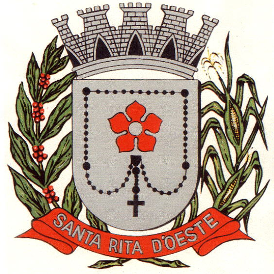 Bandeira do município de Santa Rita D'Oeste - SP - Brasil.